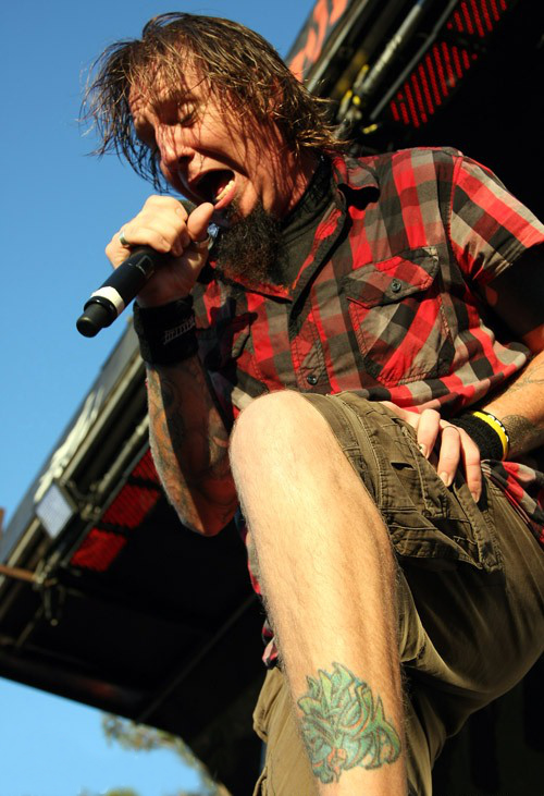 Chad Gray vocalista de Mudvayne